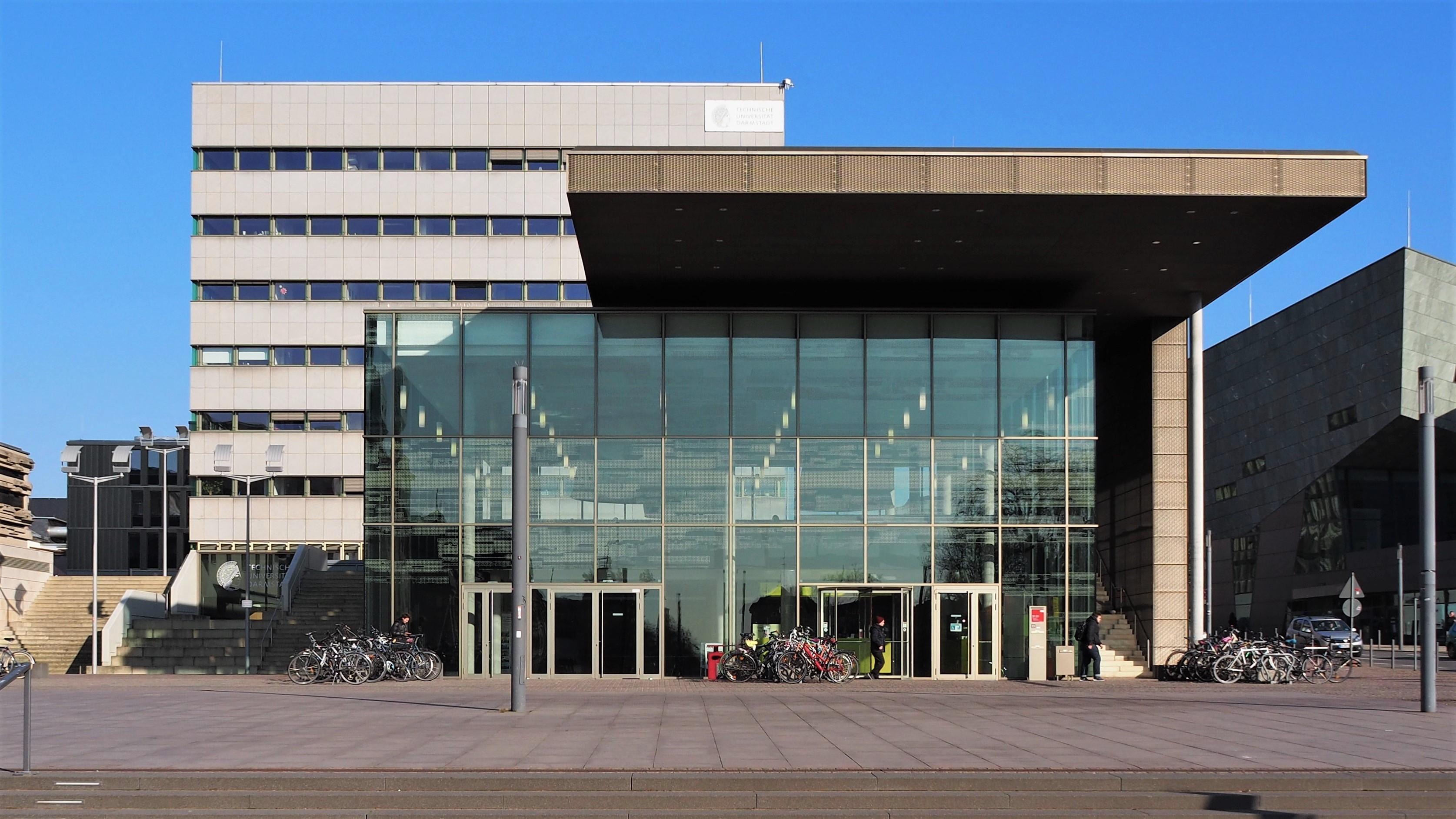 Technische Universität Darmstadt Karo5 Eingangsgebäude Karolinenplatz Darmstadt Verwaltungsgebäude